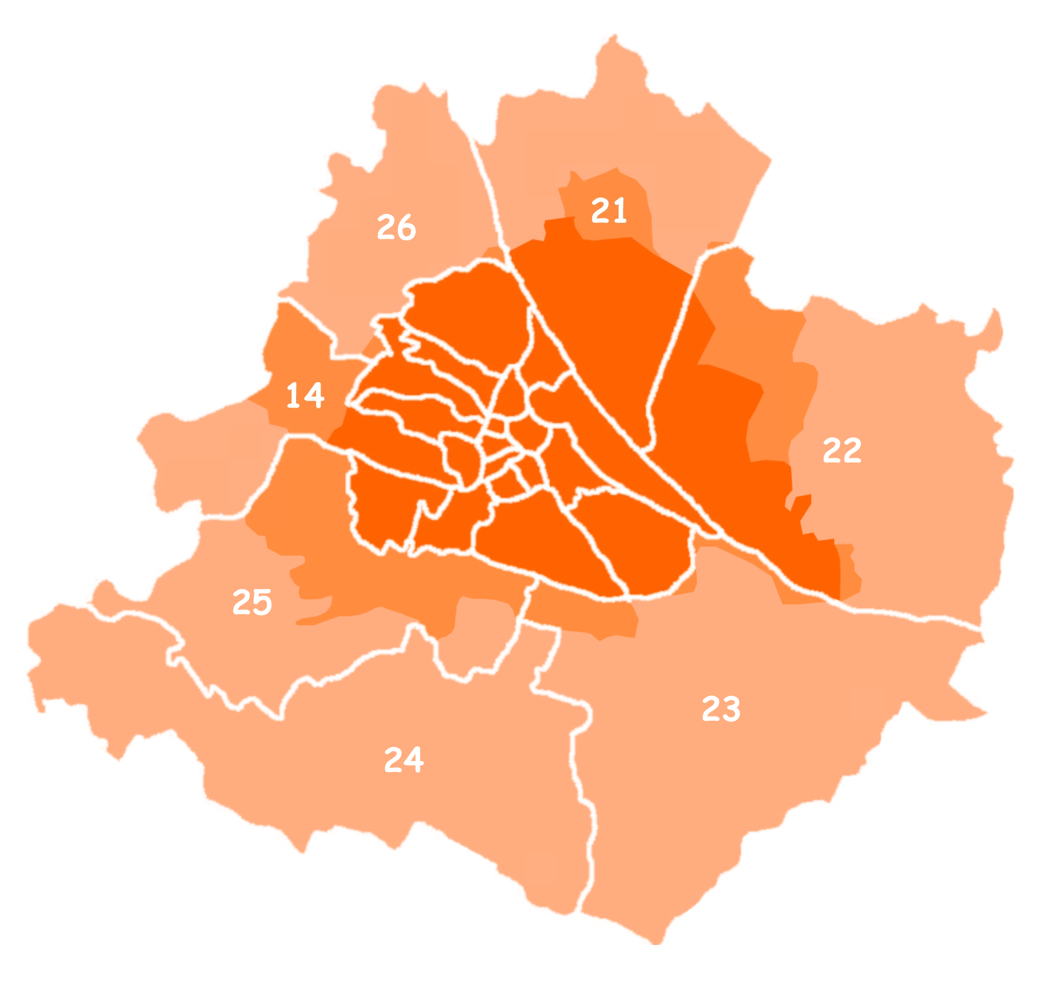 Karte von Groß-Wien (alte Grenzen dunkelorange, neue Grenzen hellorange, heutige Grenzen mittelorange).